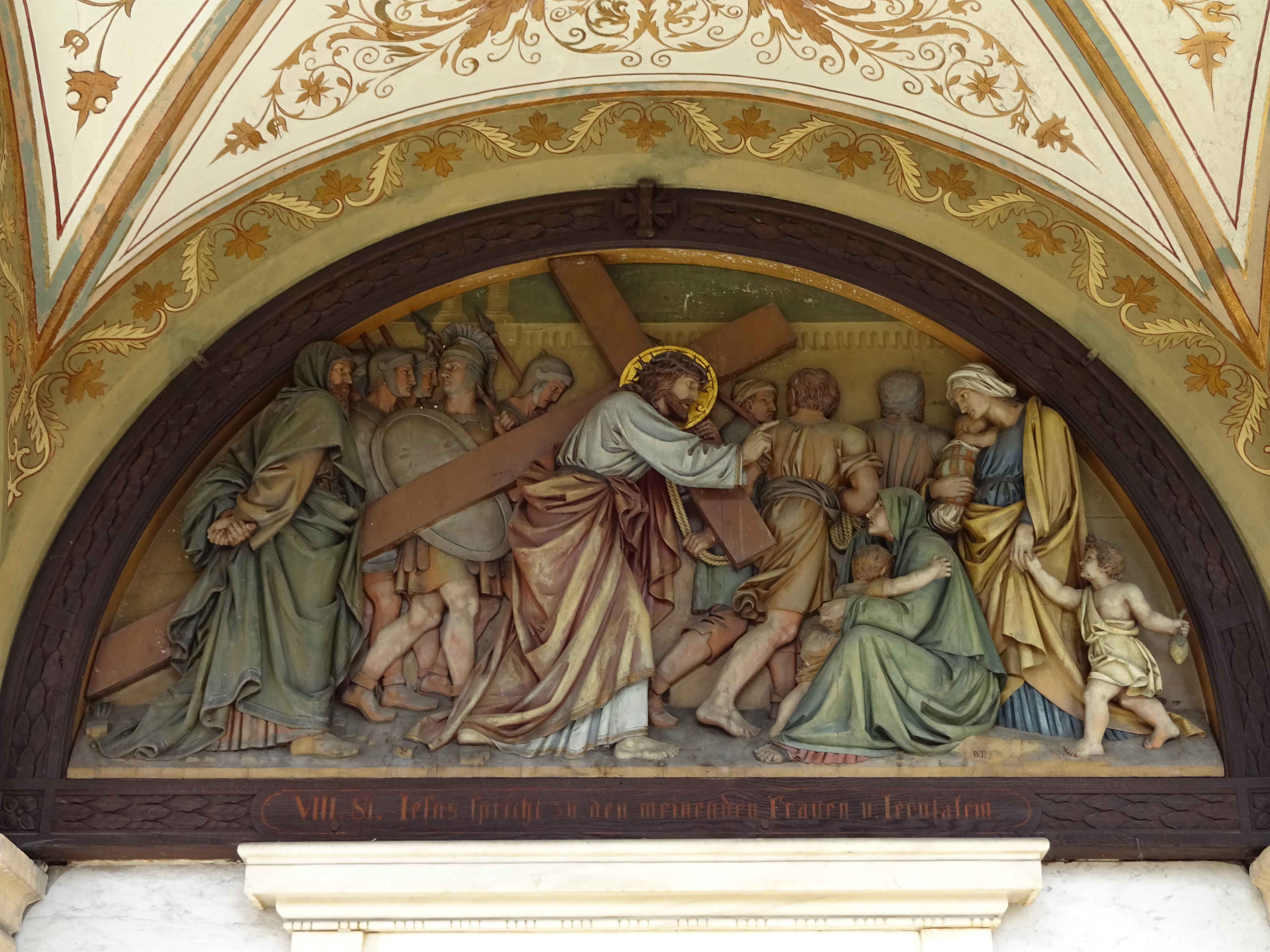 Tiroler Landesfriedhof Mariahilf, Kreuzwegstationen von Dominikus Trenkwalder in den Arkaden: VIII. Station This media shows the remarkable cultural object in the Austrian state of Tyrol listed by the Tyrolean Art Cadastre with the ID 83557. (on tirisMaps, pdf, more images on Commons, Wikidata)